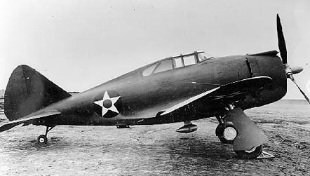 Republic P-43A-1 (S/N 41-31449)